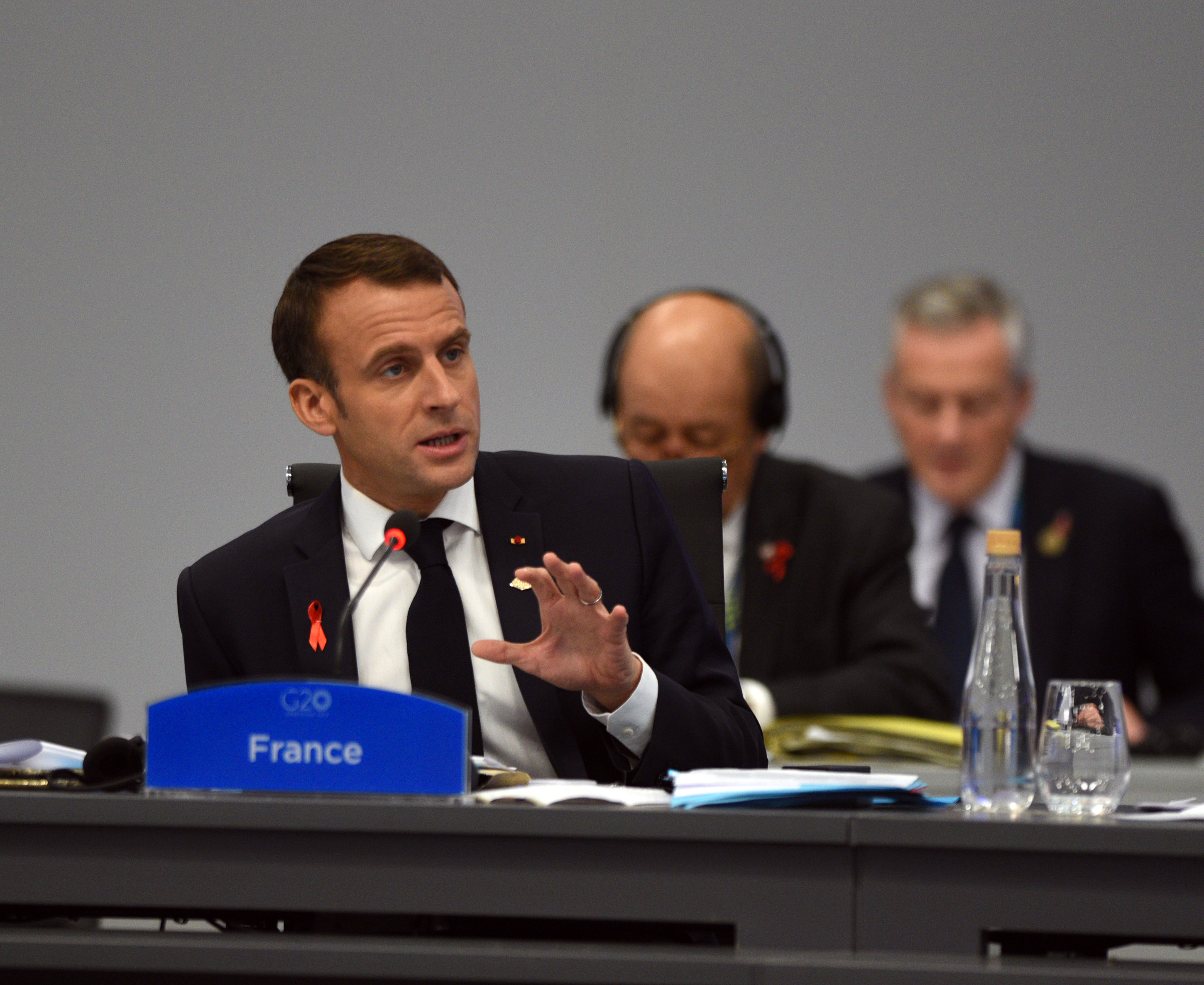 Plenaria - Día 2